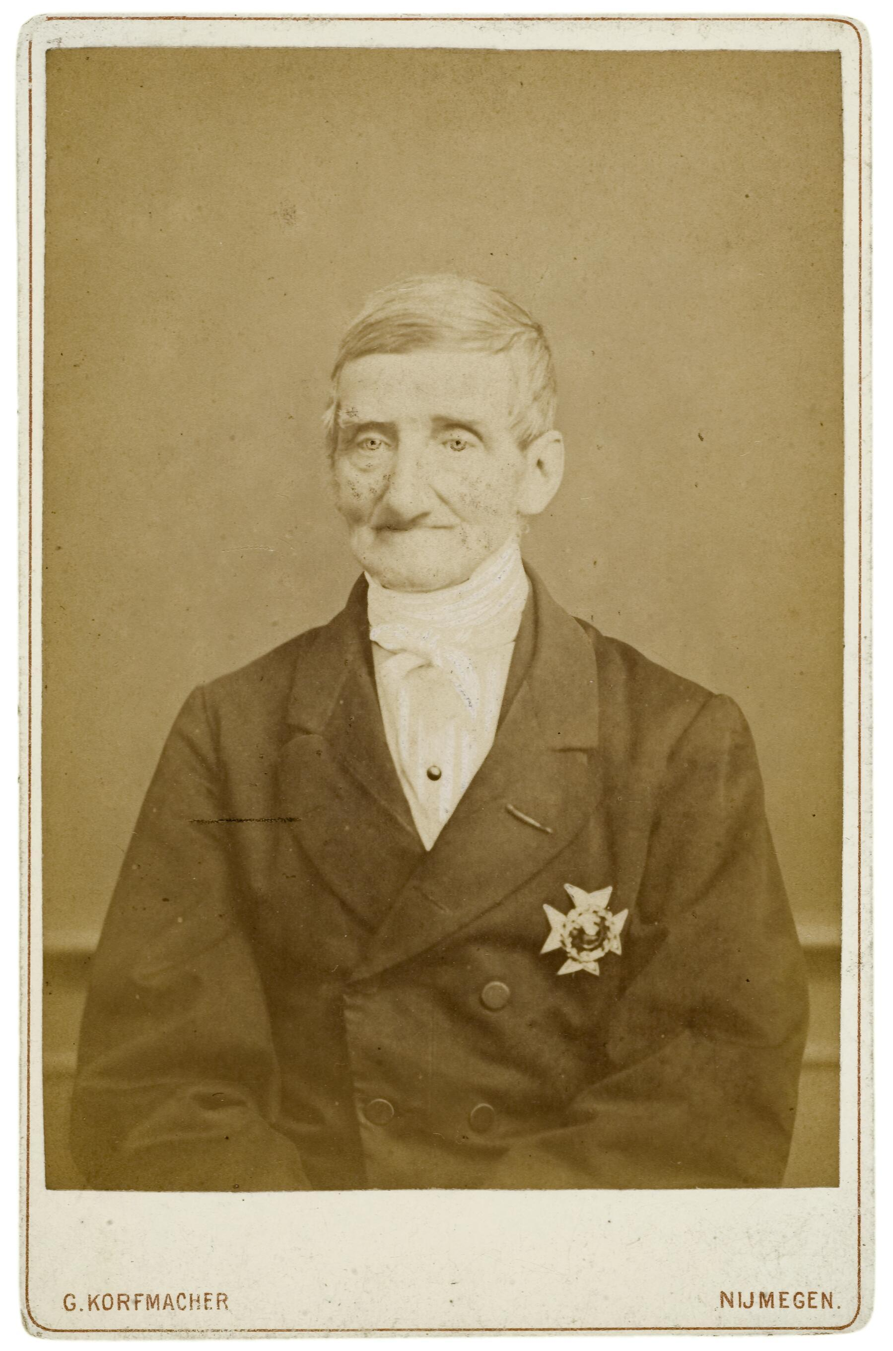 portret van de Nijmeegse burgemeester François Pierre Bijleveld